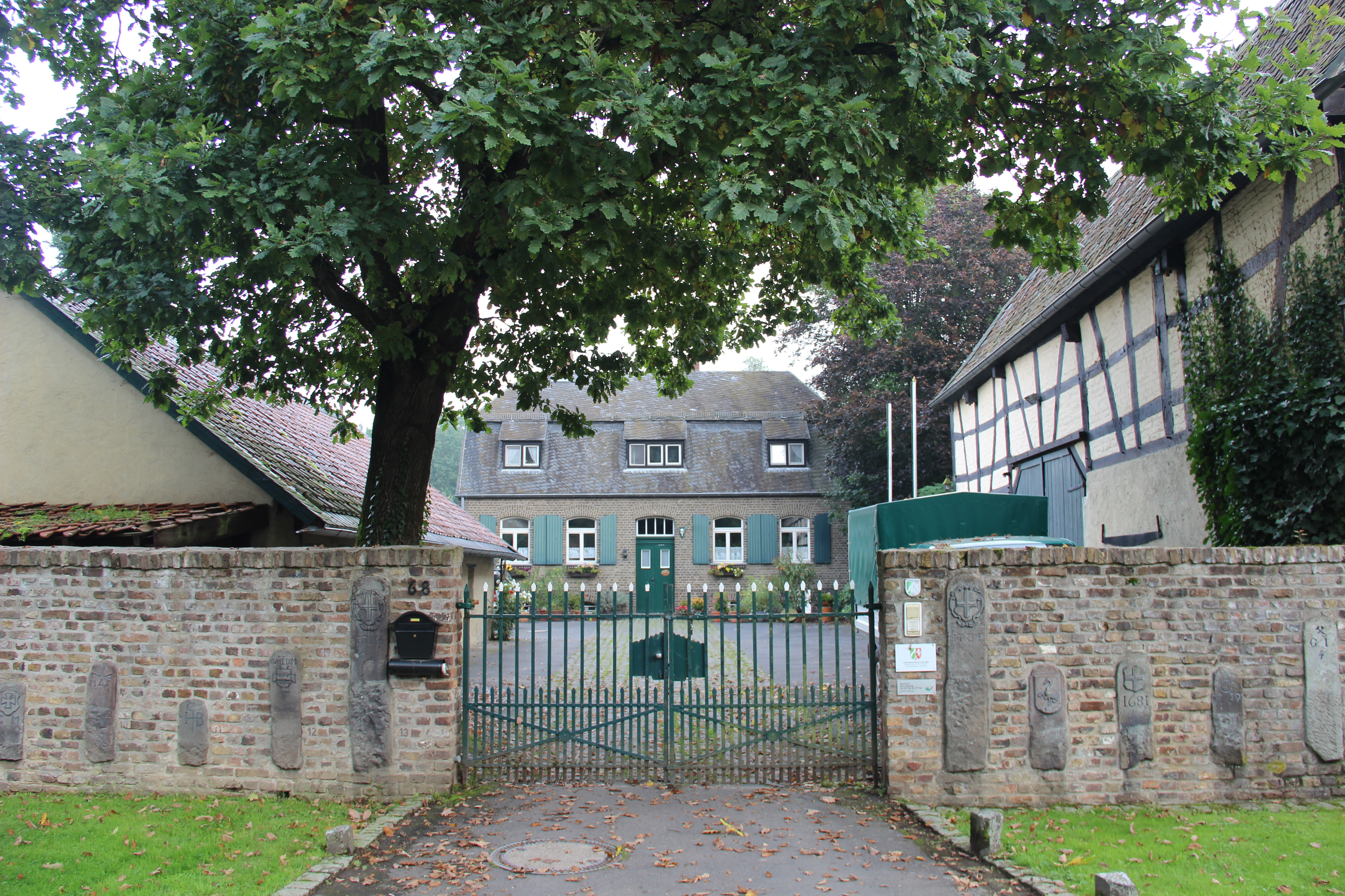 Forstdienstgebäude „Schönwaldhaus“ im Kottenforst, Villiper AlleeThis is a photograph of an architectural monument. 643